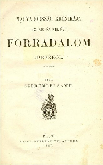 Szeremlei Sámuel: Magyarország krónikája az 1848. és 1849. évi forradalom idejéből című könyvének címlapja. Emich Gusztáv kiadványa.